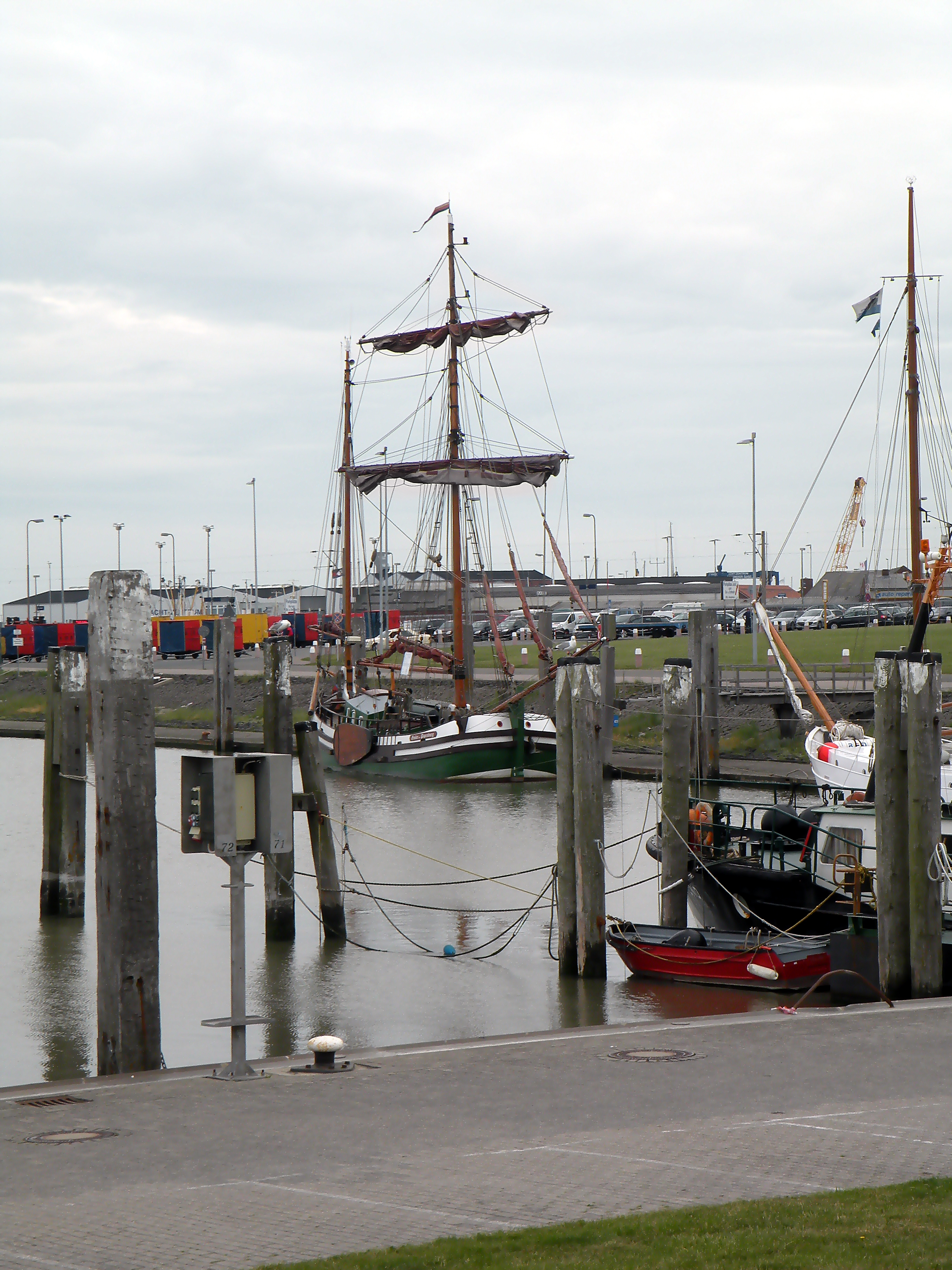 Tide_1.Norddeich.Beach.(Ostfriesland)